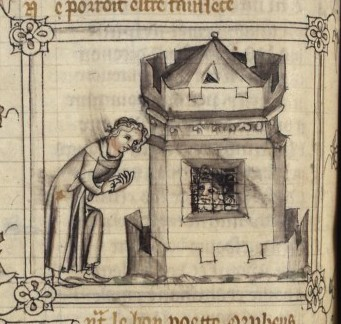 Machaut et Charles II le Mauvais